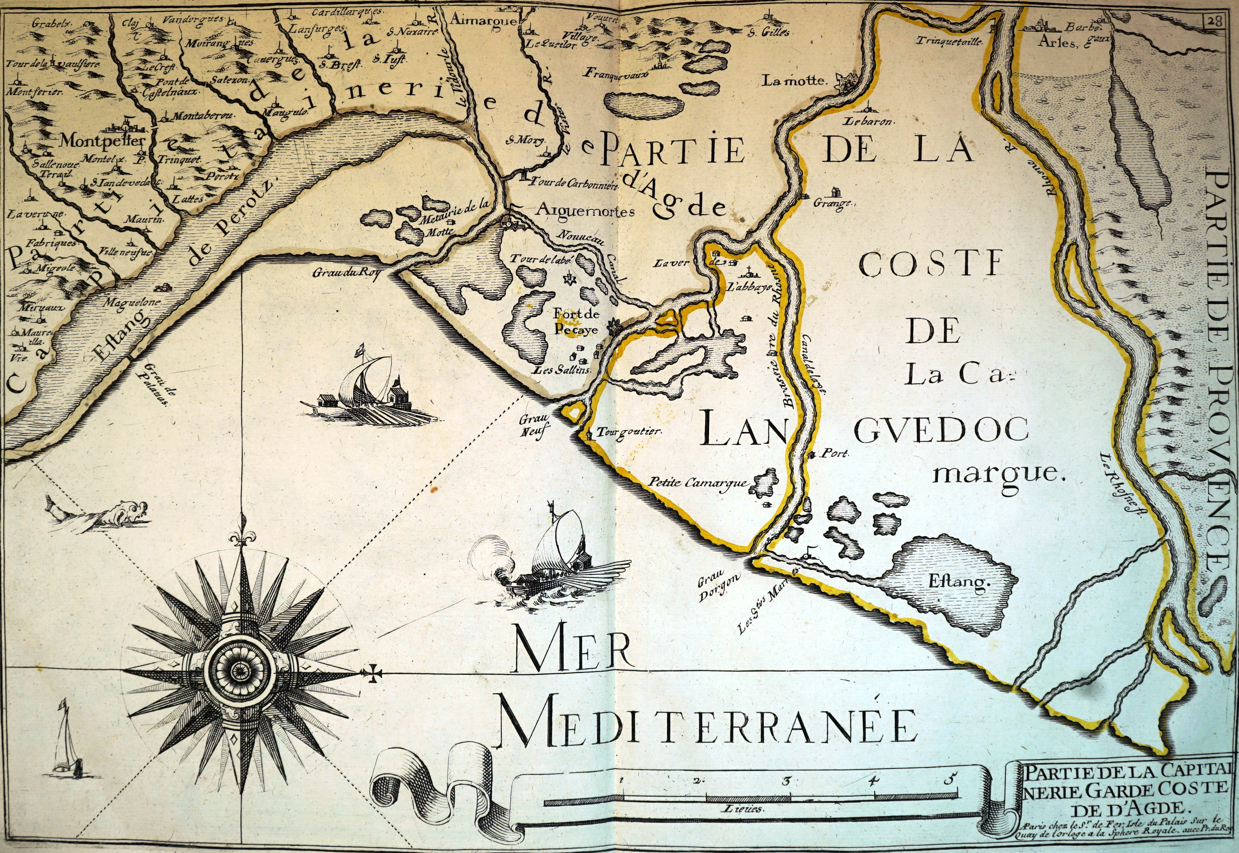 Estang de Perotz, relevé par C. Tassin.